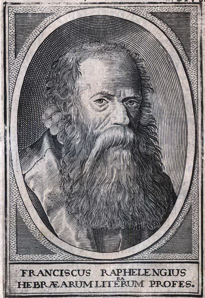 Koperdruk Franciscus Raphelengius van een gravure door Frans van Ravelingen (1539-1597), boekdrukker.